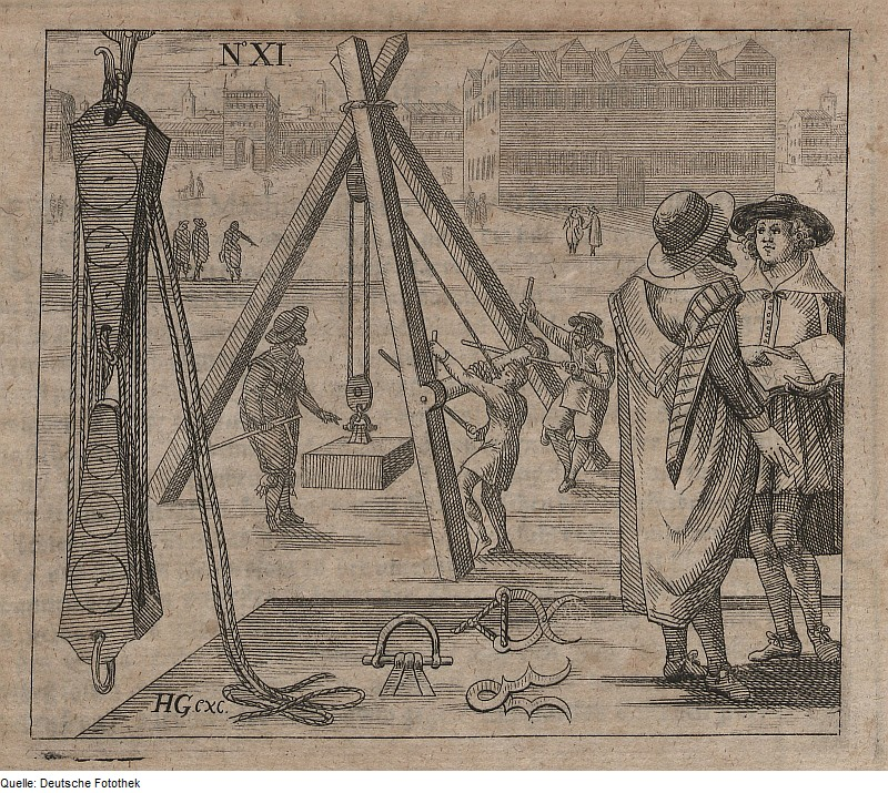 Original image description from the Deutsche FotothekMechanik & Hebezeug & Winde & Seil